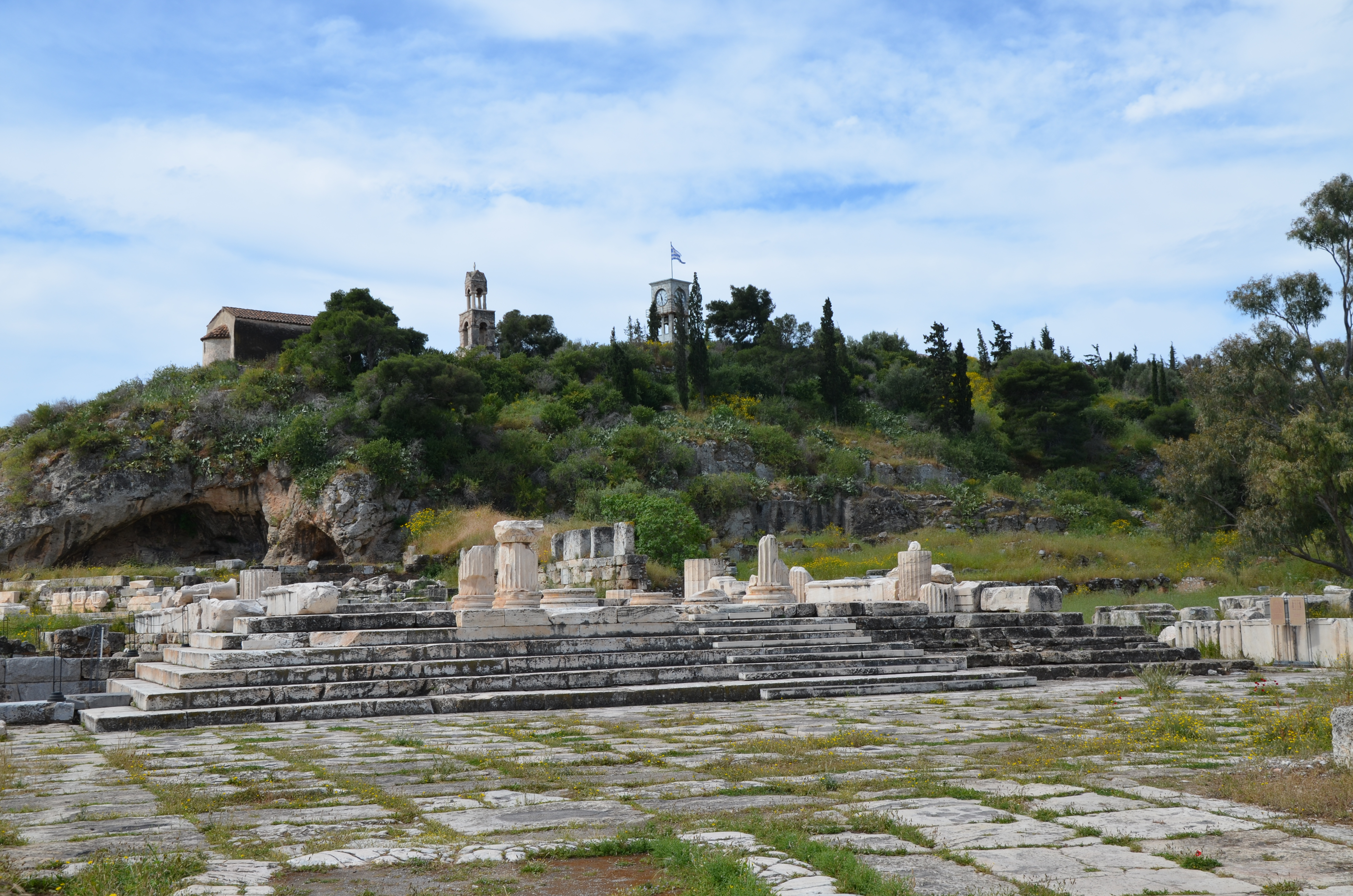 Eleusis